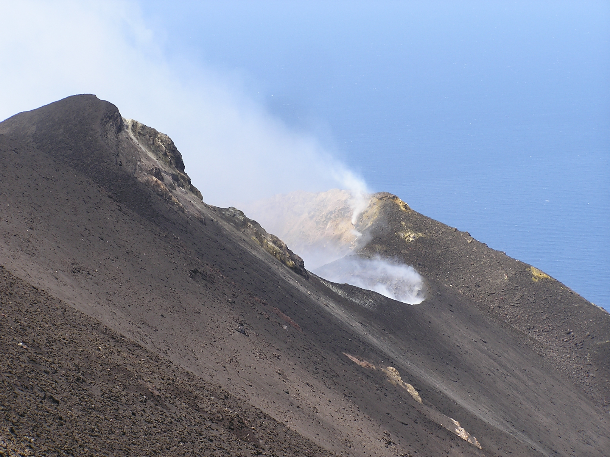 Stromboli, crater